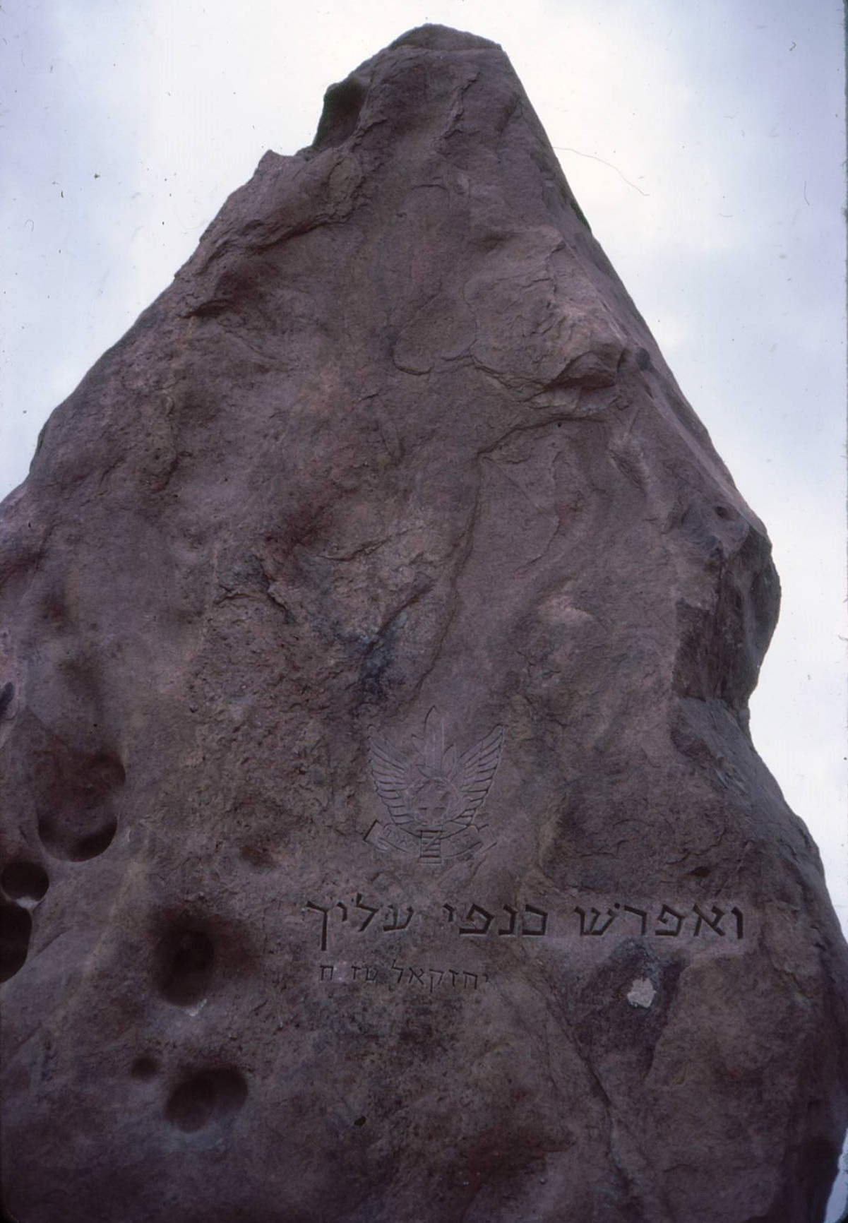 Dayan Rock